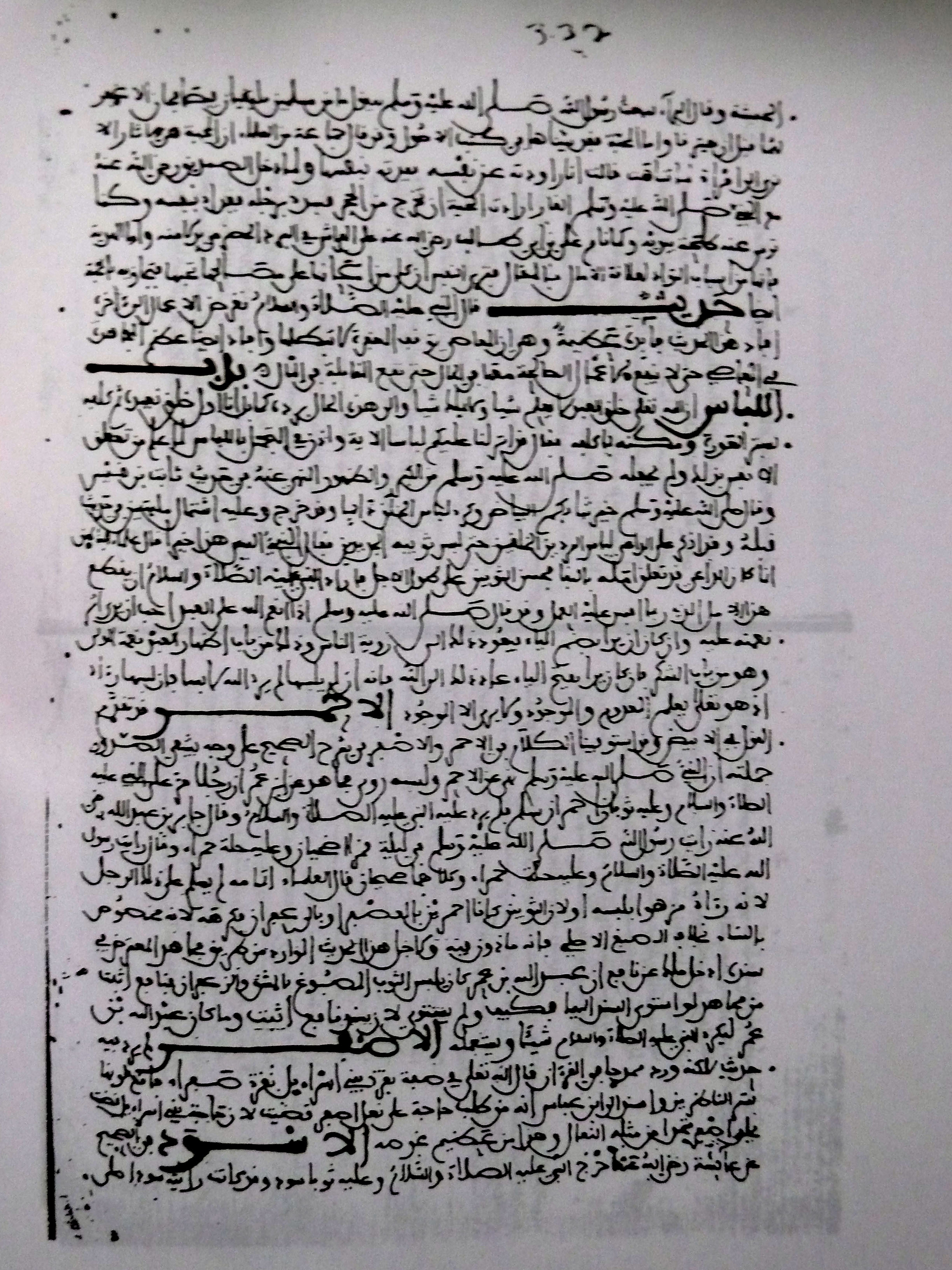 Reproduktion einer Seite aus einer Handschrift aus dem 12. Jahrhundert: das K. al-Qabas von Ibn al-'Arabi Bibliothek Rabat, Marokko